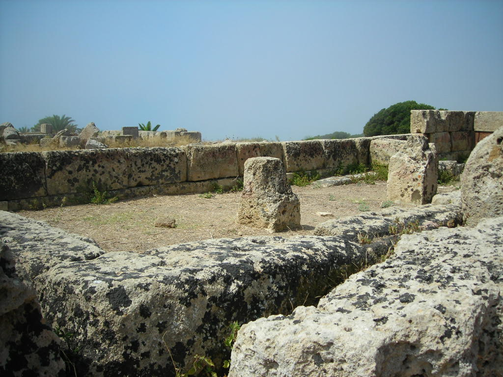 Selinunte